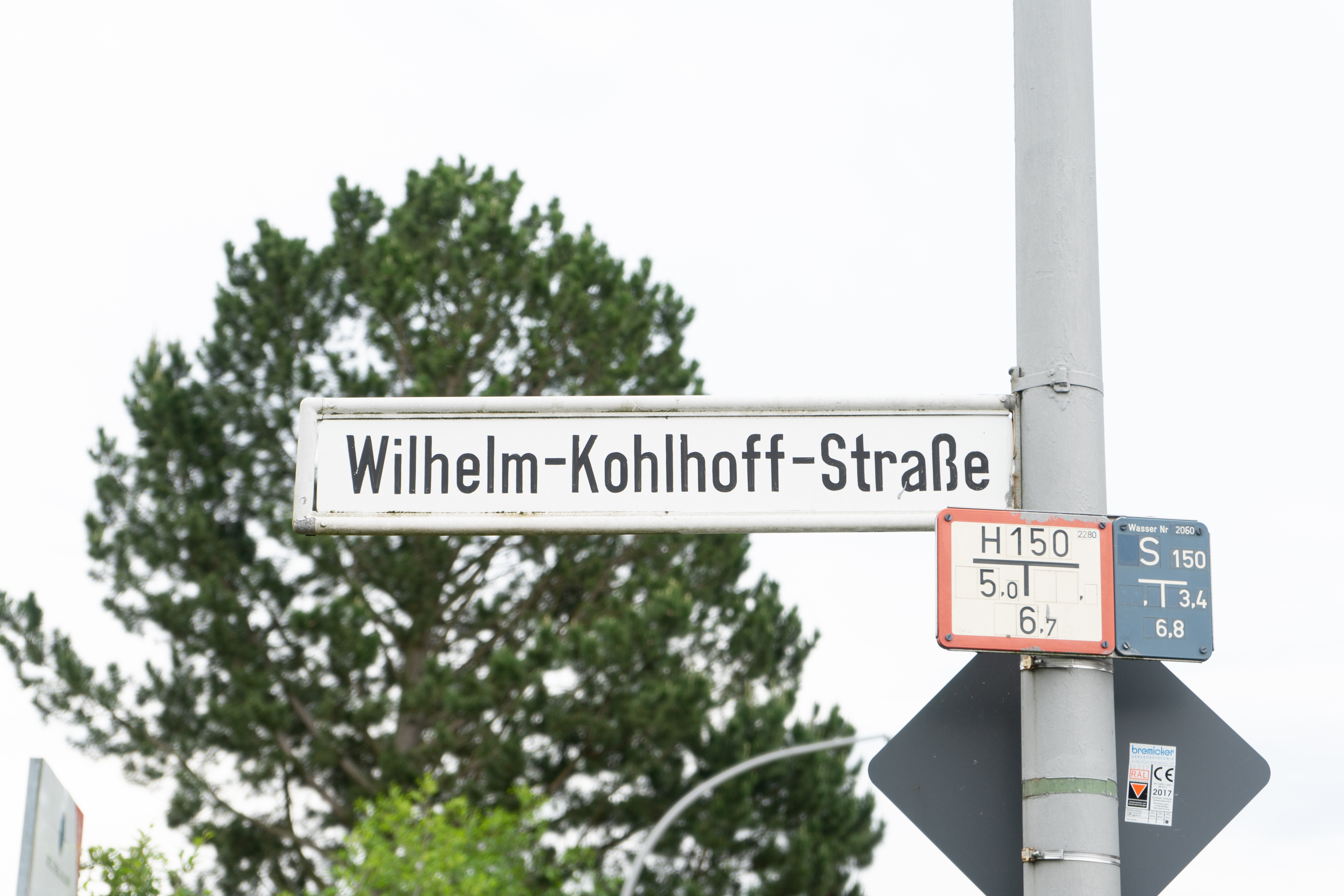 Straßenschild der Wilhelm-Kohlhoff-Straße, benannt nach Wilhelm Kohlhoff.